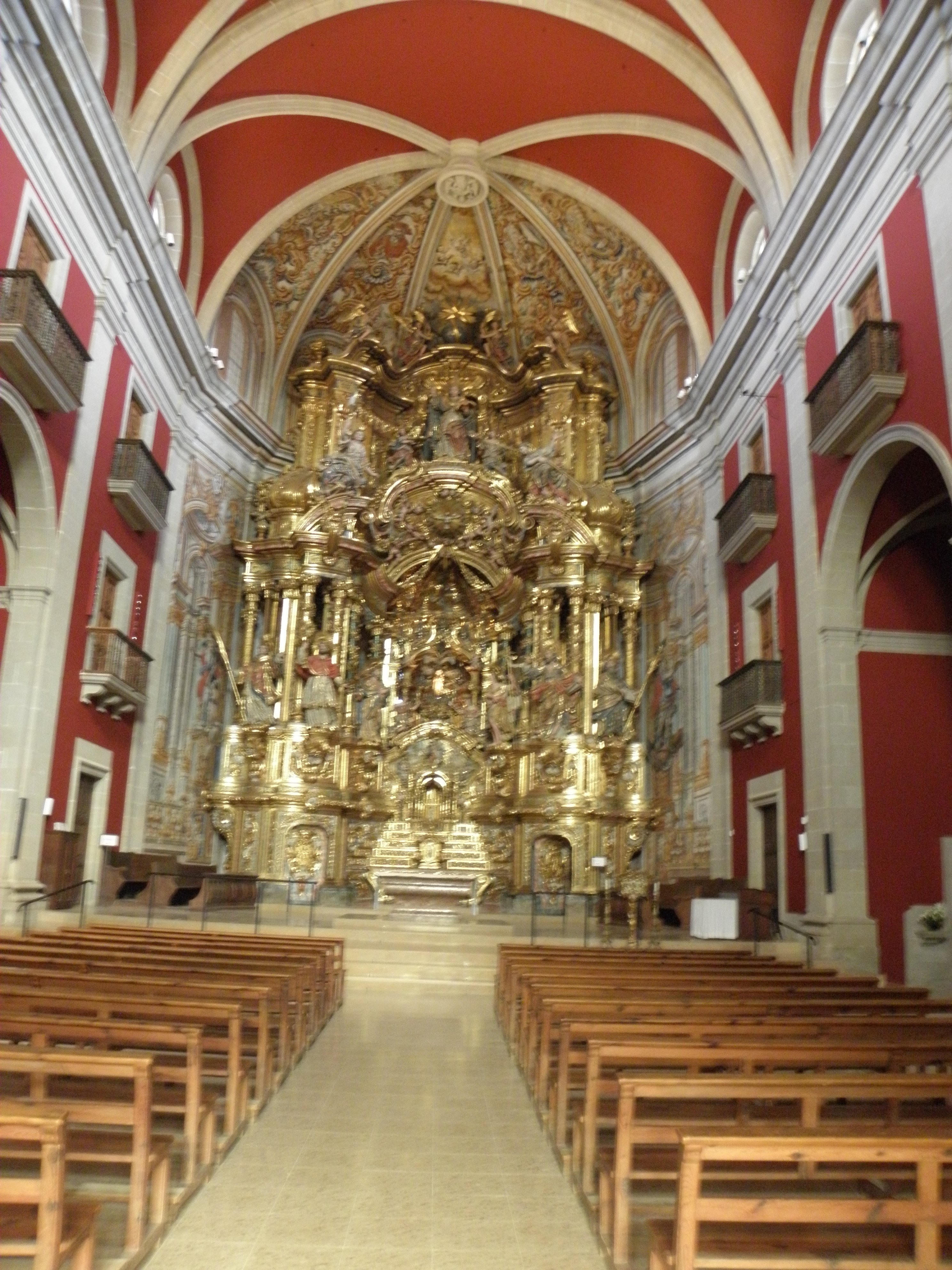 Interior de l'església del Santuari del Miracle (Riner, Solsonès).